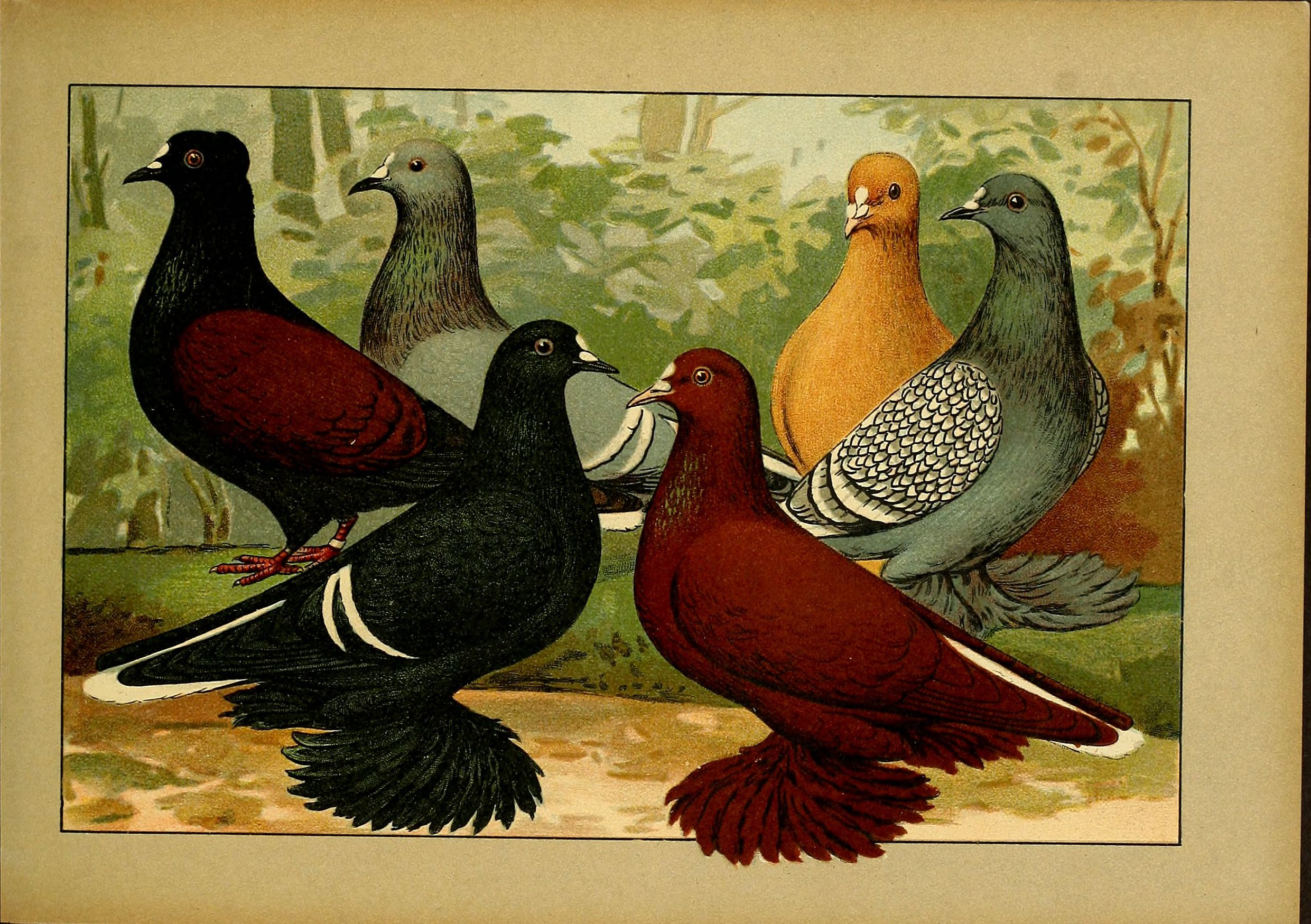 Deutsch